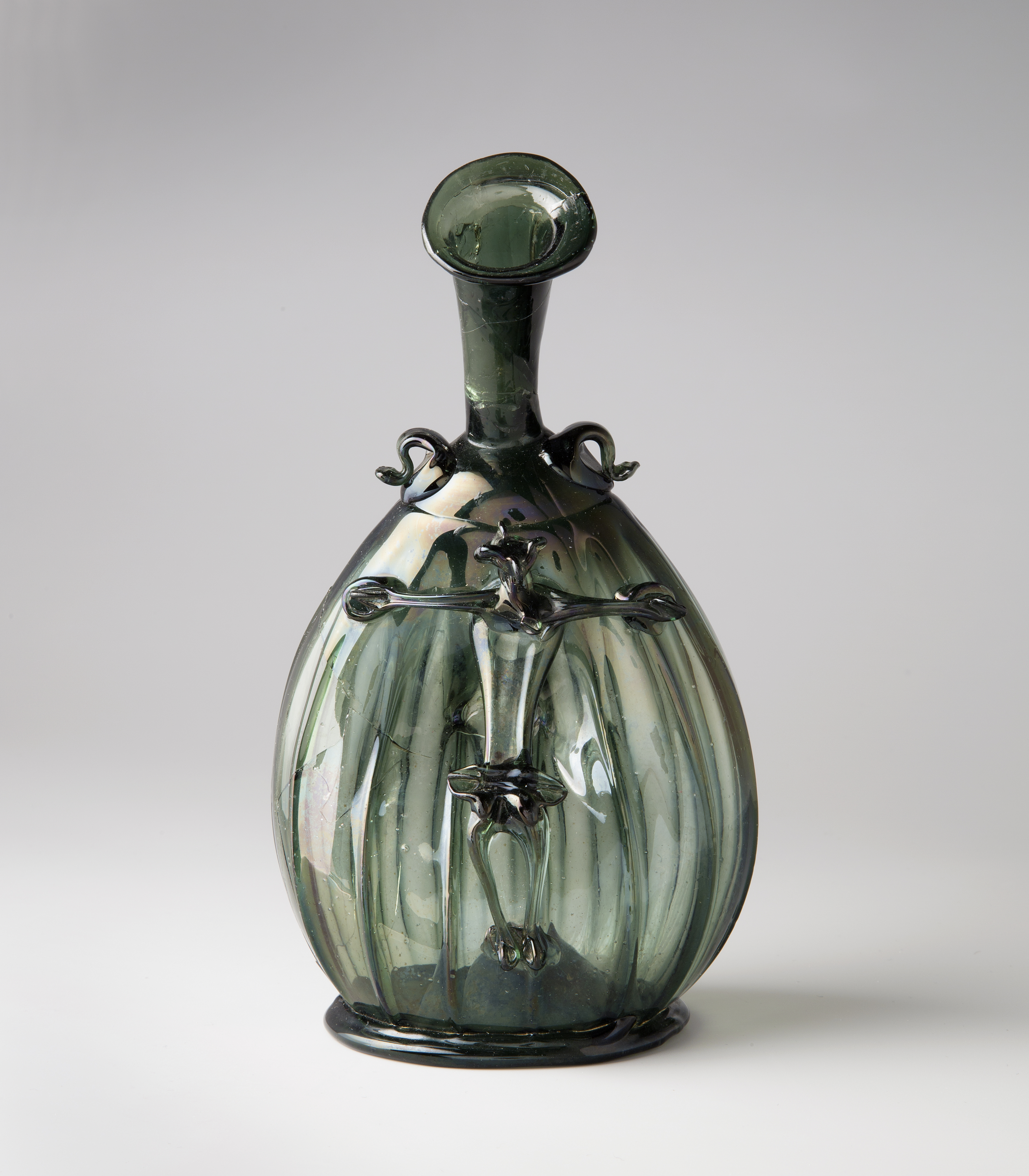 German; Flask; Glass-Vessels